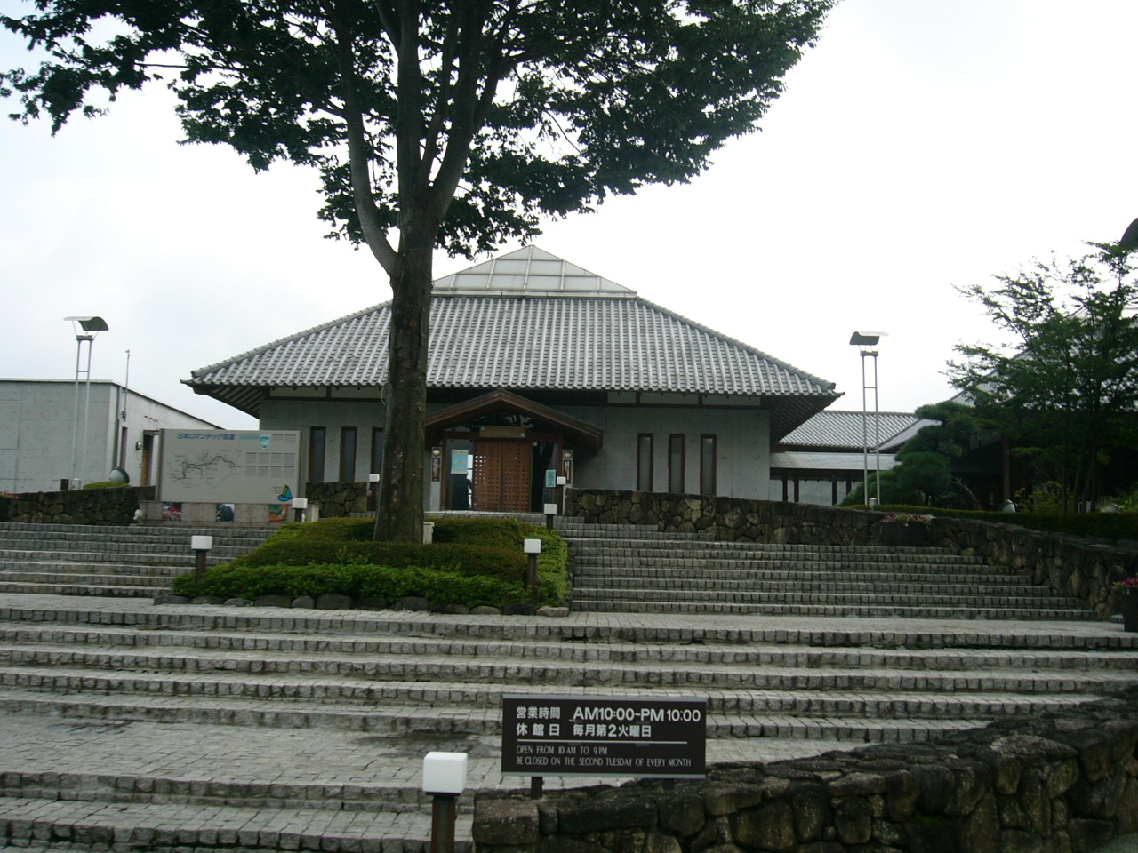 Michinoeki Shirasawa (Gunma) (道の駅白沢)